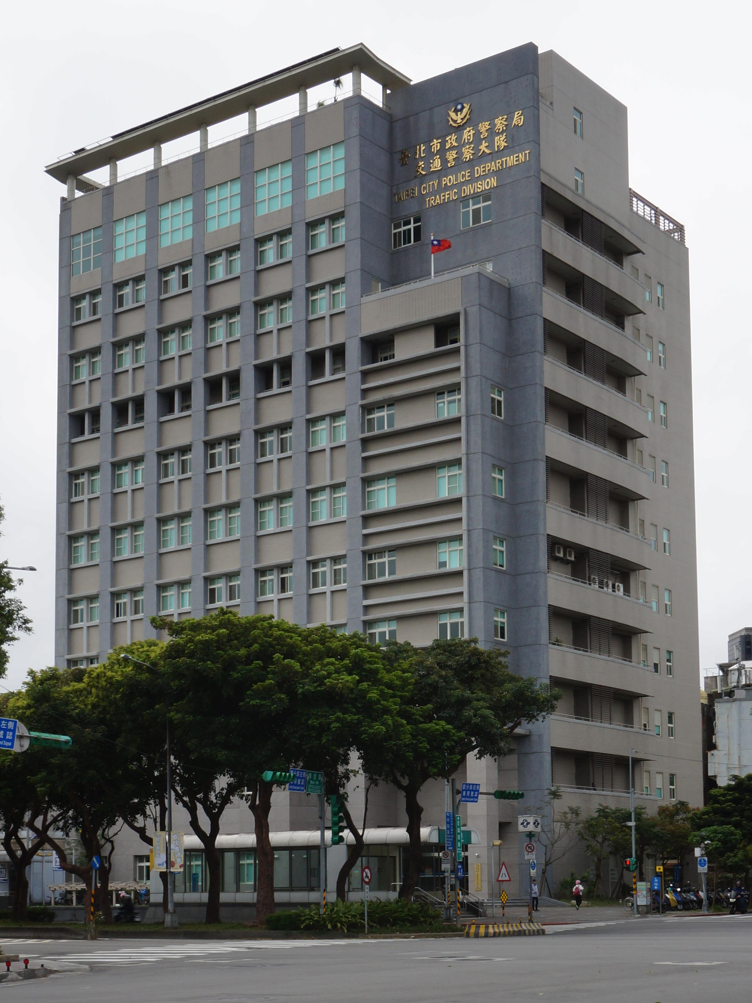 臺北市政府警察局交通警察大隊辦公大樓，位於臺北市中正區愛國西路26號。